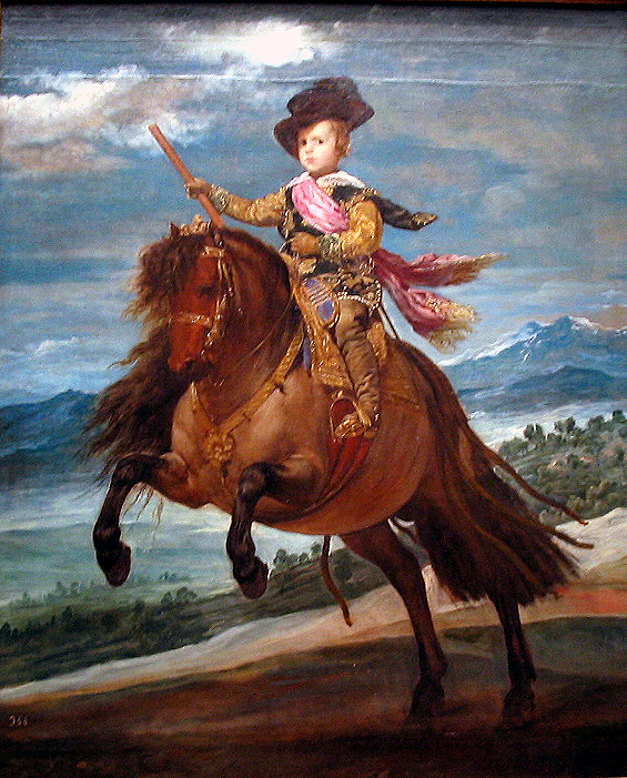 Retrato ecuestre del príncipe Baltasar Carlos de Austria (1629-1646), que fue hijo del rey Felipe IV de España y de la reina Isabel de Borbón.